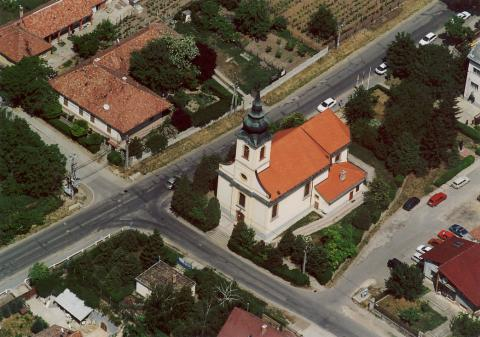 Csömör, Hungary, aerial photography. Szentháromság római katolikus templom